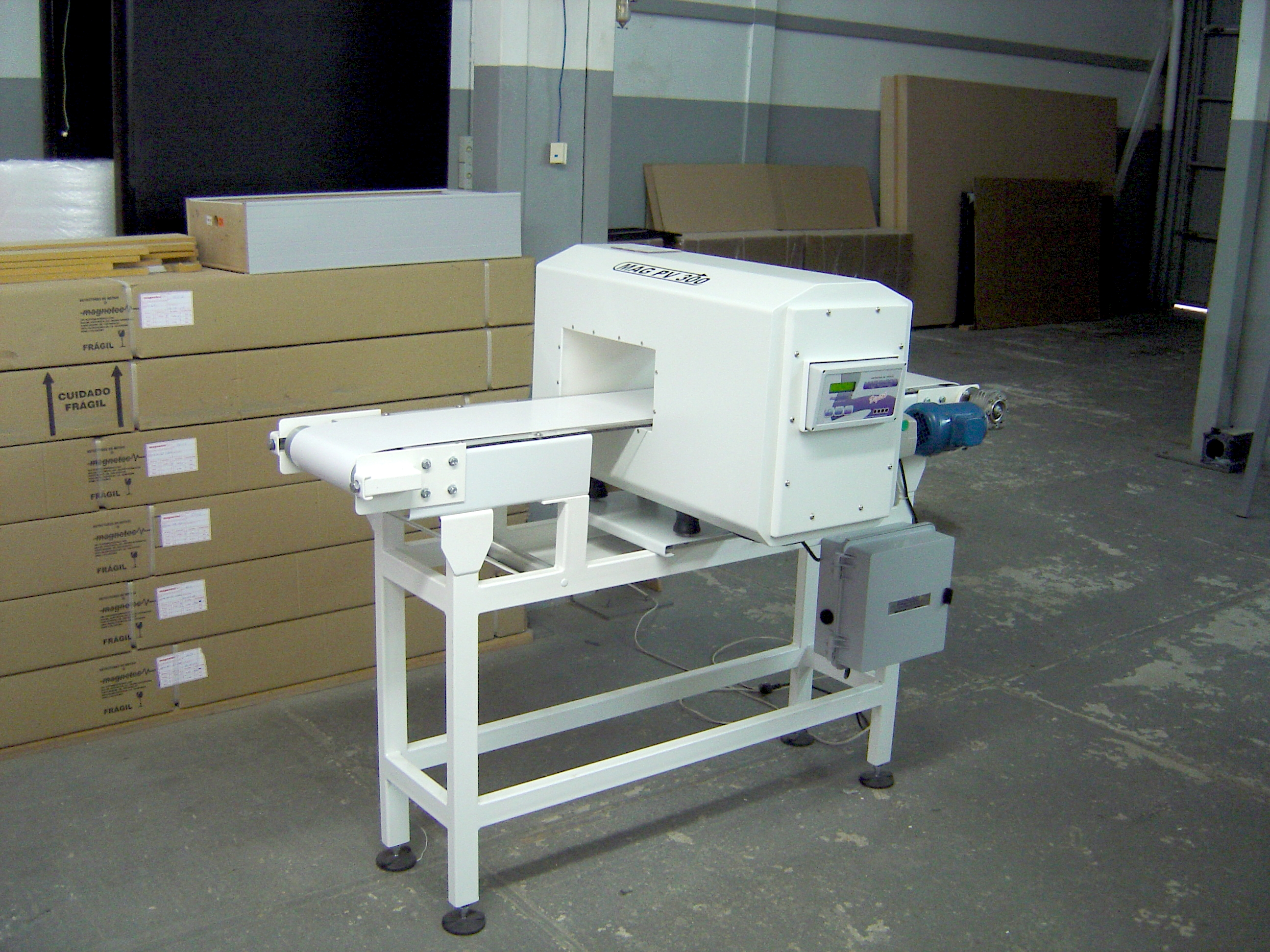 Foto por Pedro O. S. S.